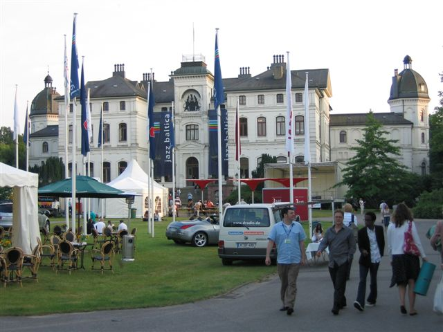 JazzBaltica festival at Schloss Salzau 2006